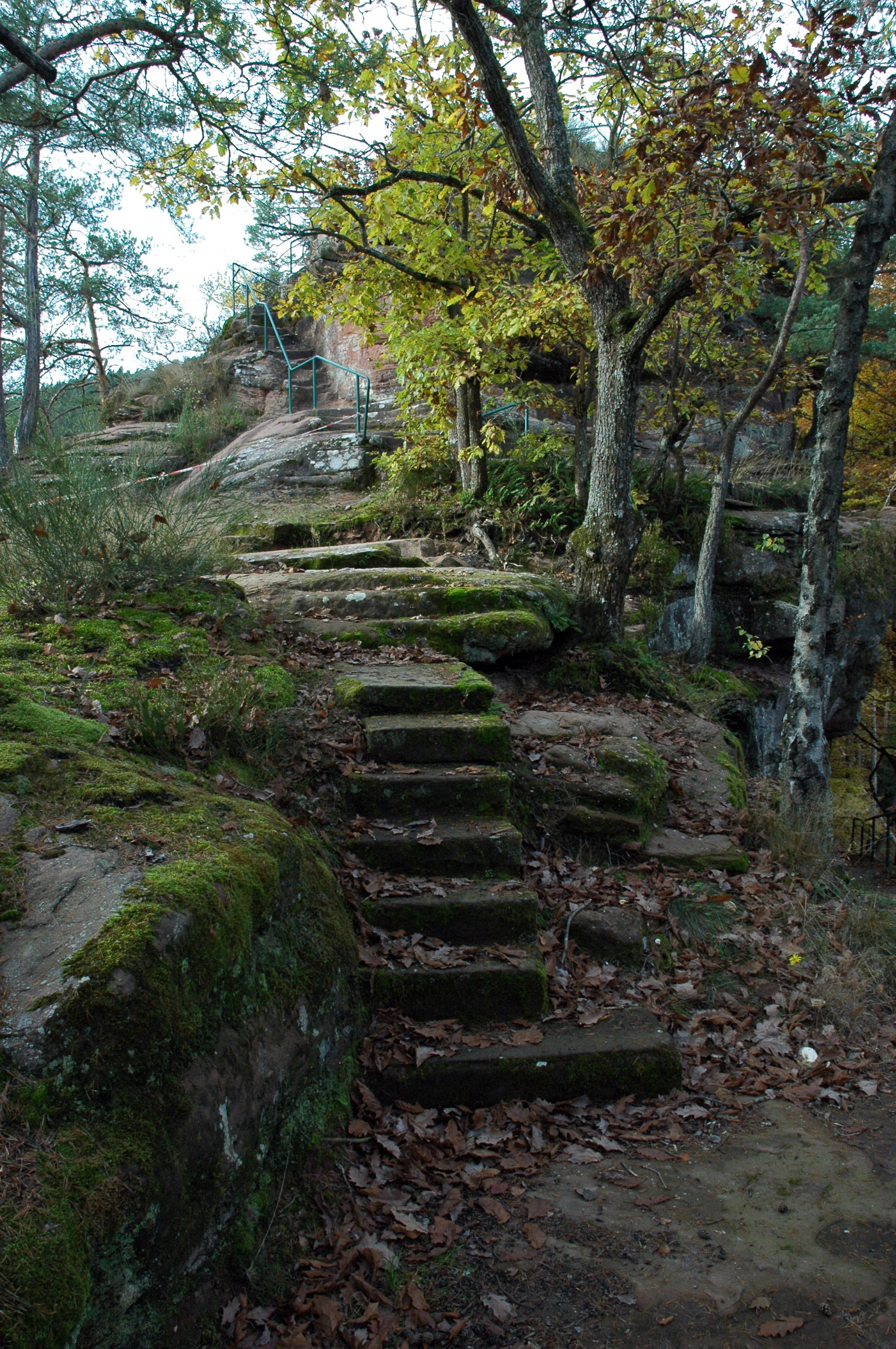 Treppen auf der Wilgartaburg